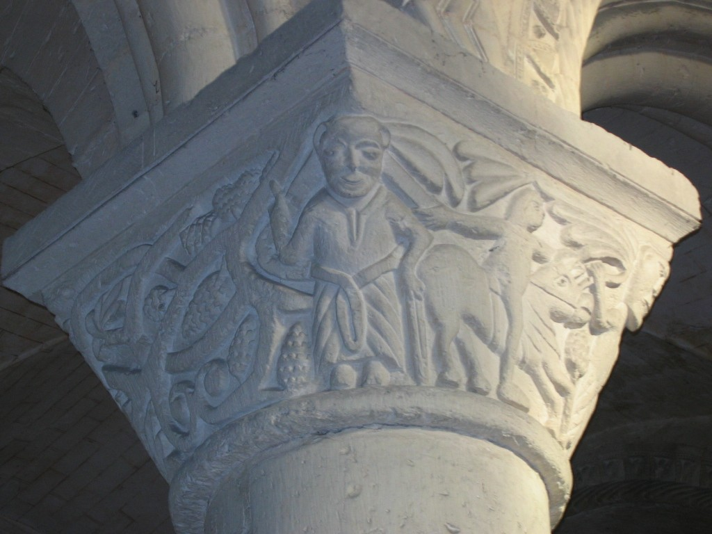 Chapiteau de l'abbatiale Saint-Georges de Boscherville, Seine-Maritime/ Photographie personnelle prise par Urban, décembre 2004/ GFDL Urban